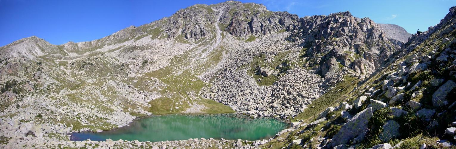 Aigüissi; la Vall de Boí, Alta Ribagorça, Catalunya